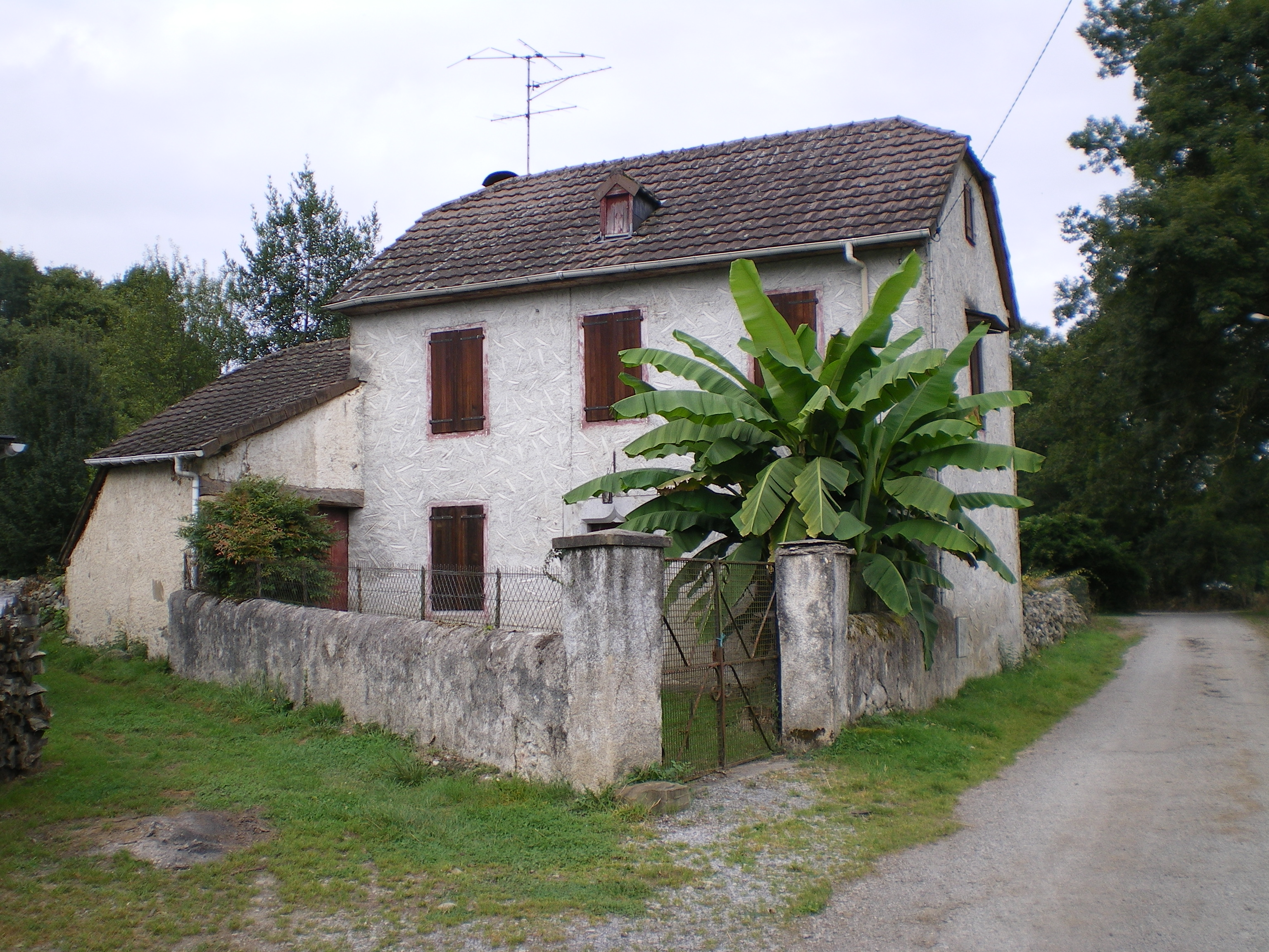 Casa típica de Busiet